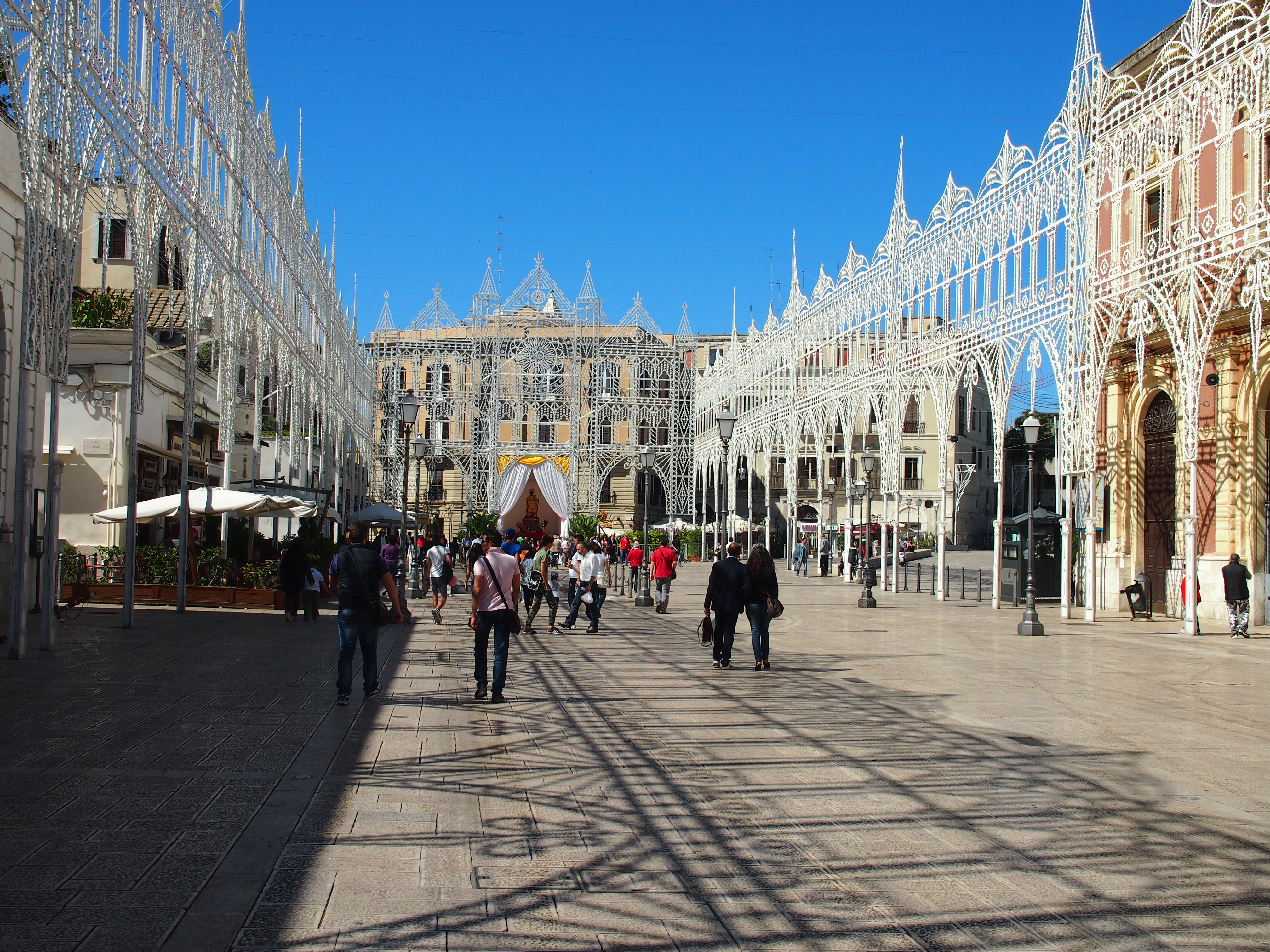 Der Platz Ferrarese, zum Fest des Sankt Nikolaus geschmückt. Im Hintergrund die Statue des Sankt Nikolaus